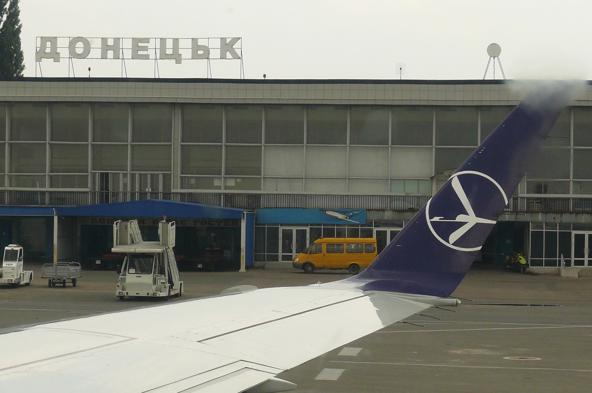 Donieck, stary port lotniczy.